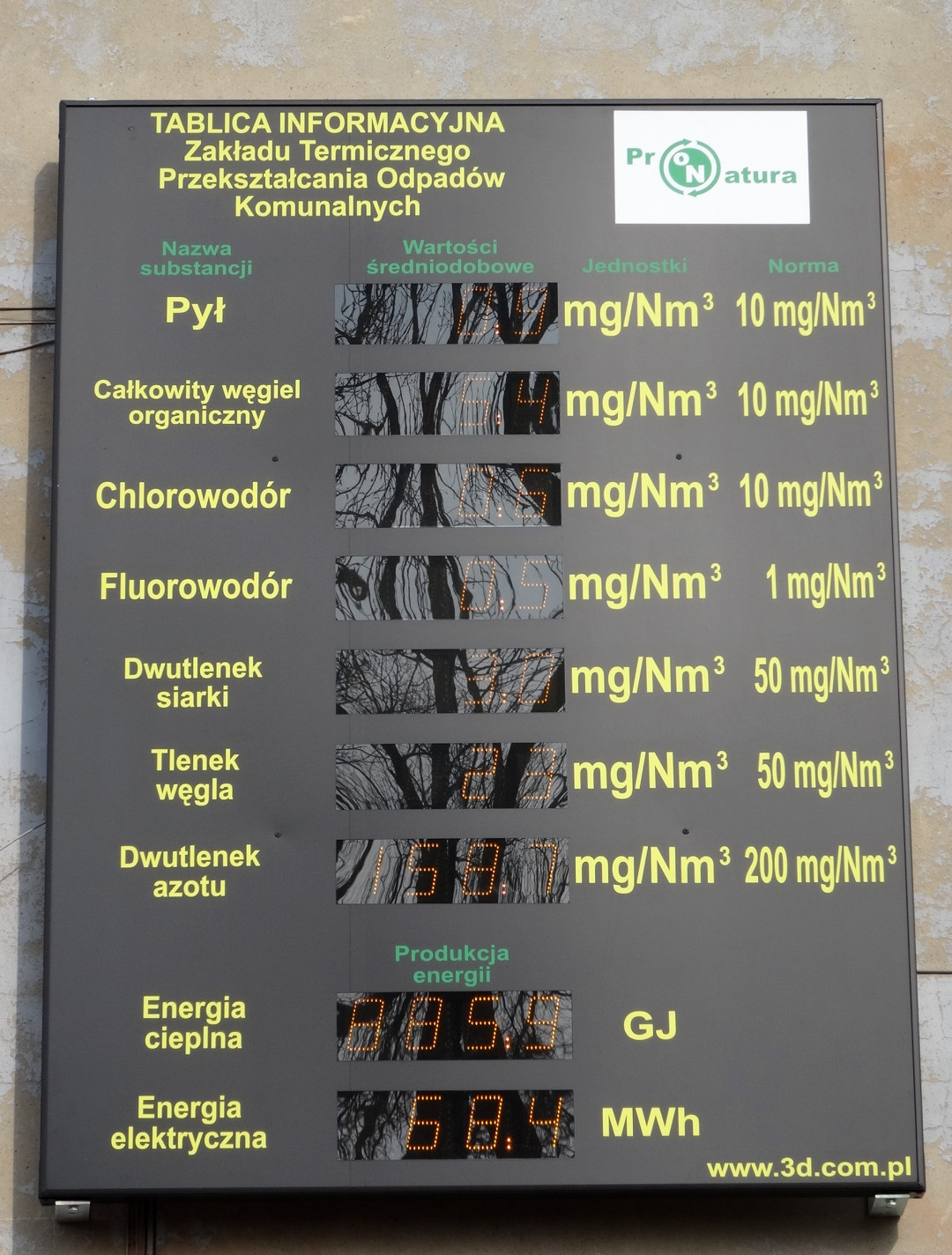 Tablica elektroniczna na ZS nr 18 przy ul. Hutniczej 89 w Bydgoszczy-Łęgnowie informująca o stanie czystości powietrza w sąsiedztwie Zakładu Termicznego Przekształcania Odpadów Komunalnych w Bydgoszczy